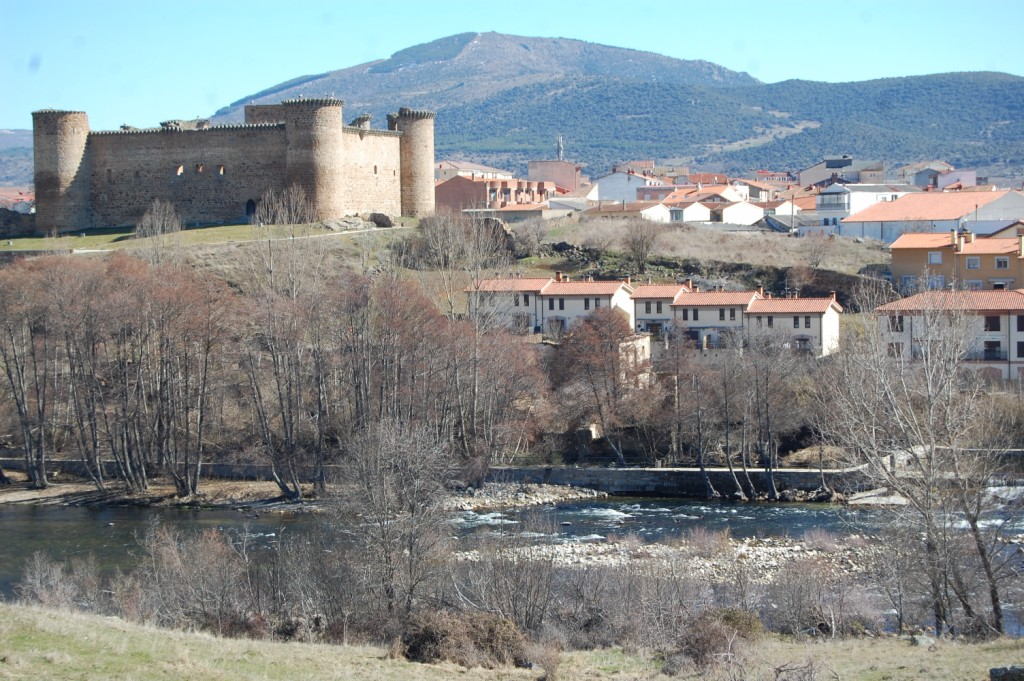 Vista de la localidad de el Barco de Ávila.